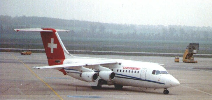 British Aerospace Avro RJ-85 (146-RJ85) der Crossair am Vienna International Airport